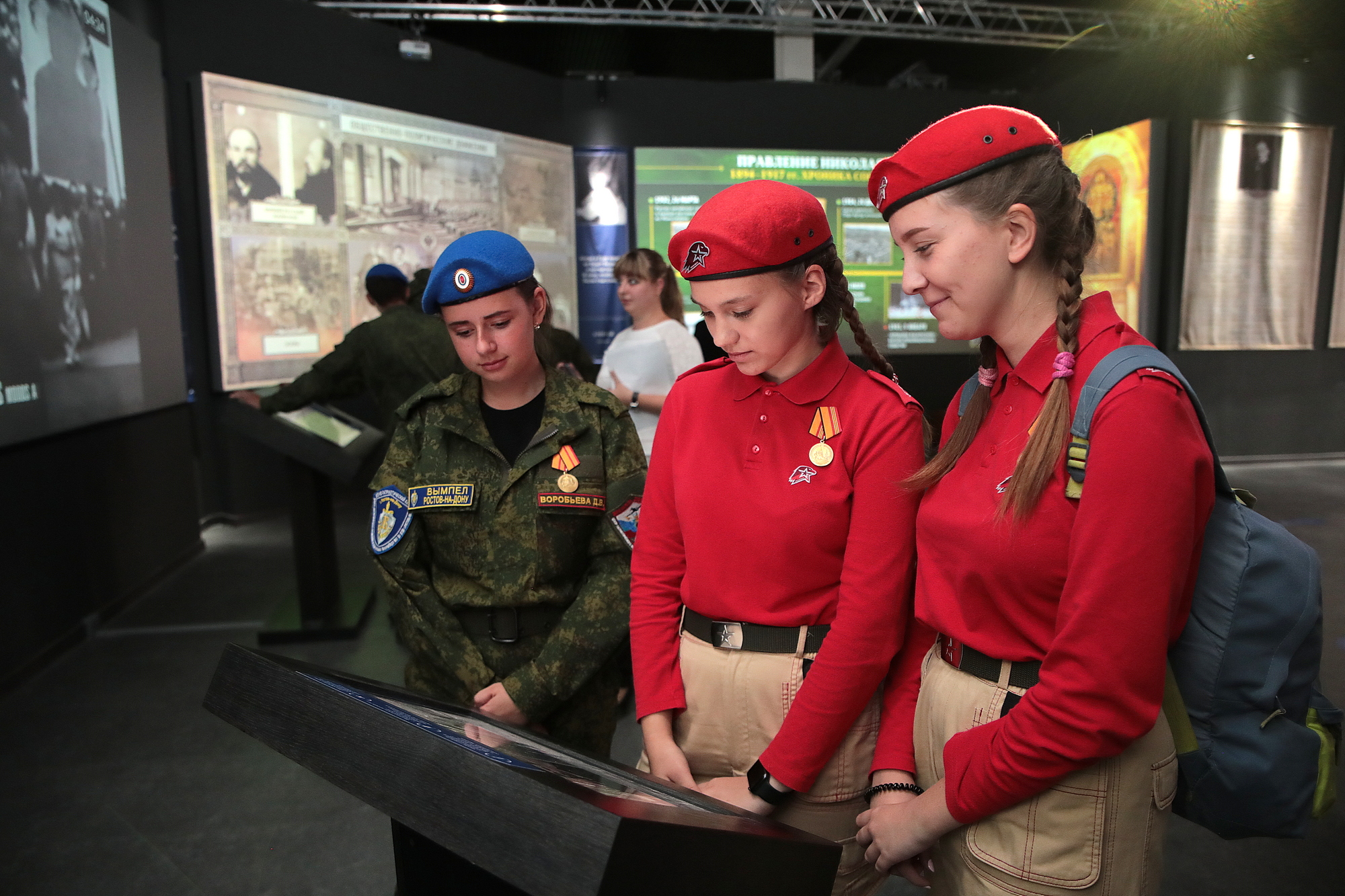 В Ростове-на-Дону открылся парк «Россия – Моя история»